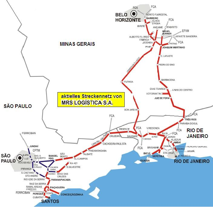 Übersicht der von MRS bedienten Strecken